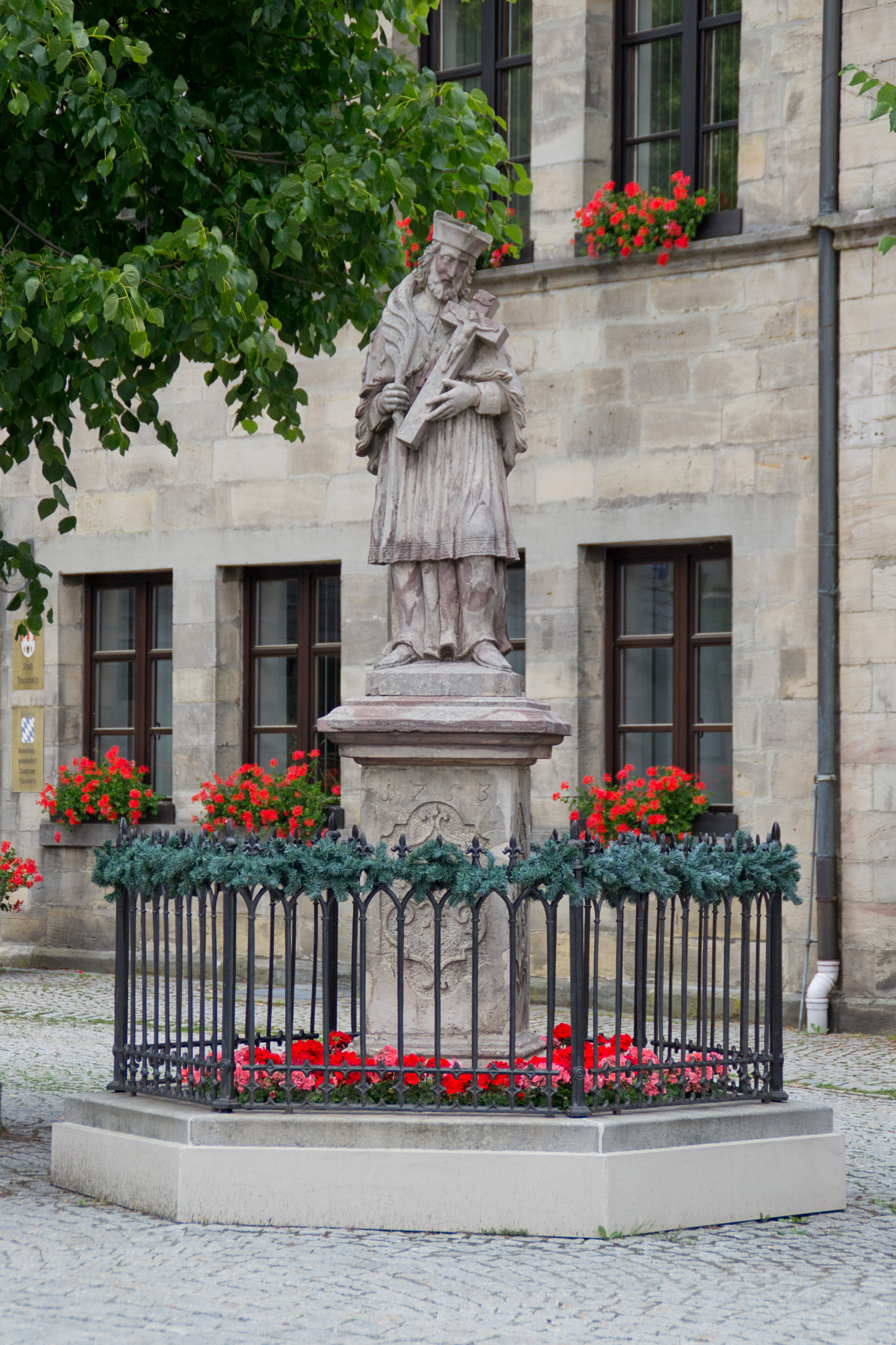 Statue des hl. Johannes Nepomuk vor dem Rathaus in Teuschnitz